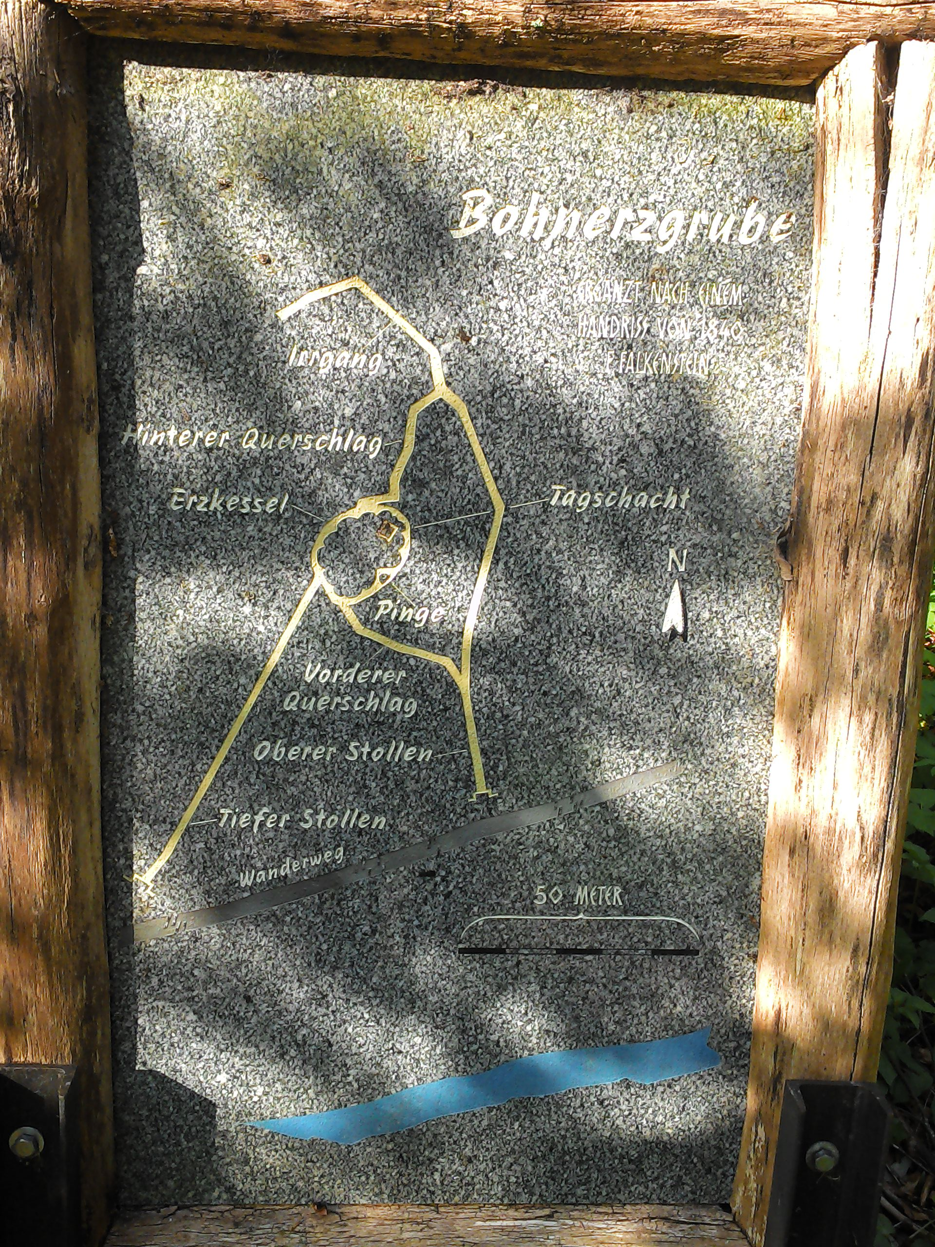 Der Erzkessel bei Küßnach, Gemeinde Küssaberg in Baden-Württemberg. Tafel mit dem Stollenplan.